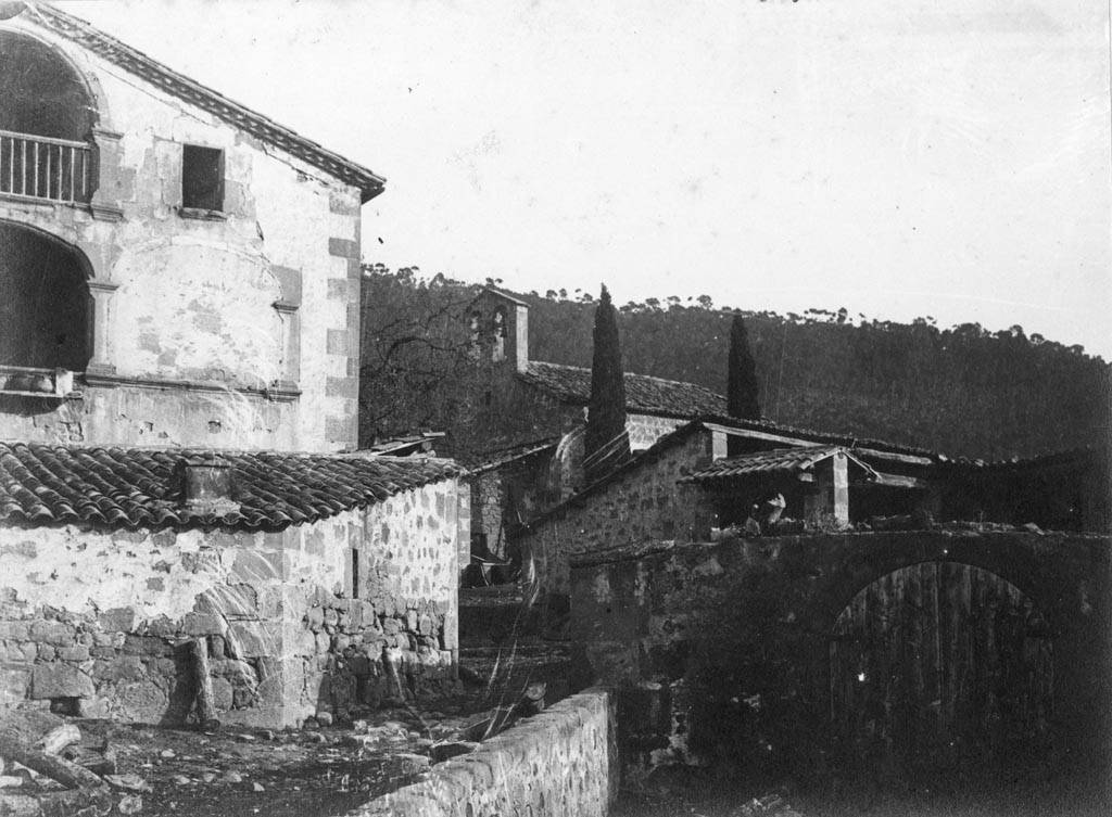 Masia de Navel amb l'església al fons. Cèsar August Torras i Ferreri (Entre 1890 i 1923)